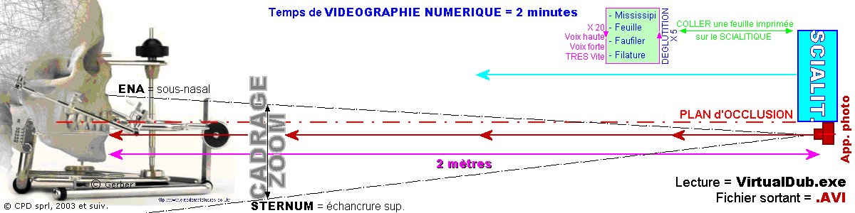 Vidéographie numérique de la fonction phonétique et de la déglutition salivaire : mise en place de l'opérateur, du patient, de l'éclairage et de l'appareil photographique (vidéo numérique).